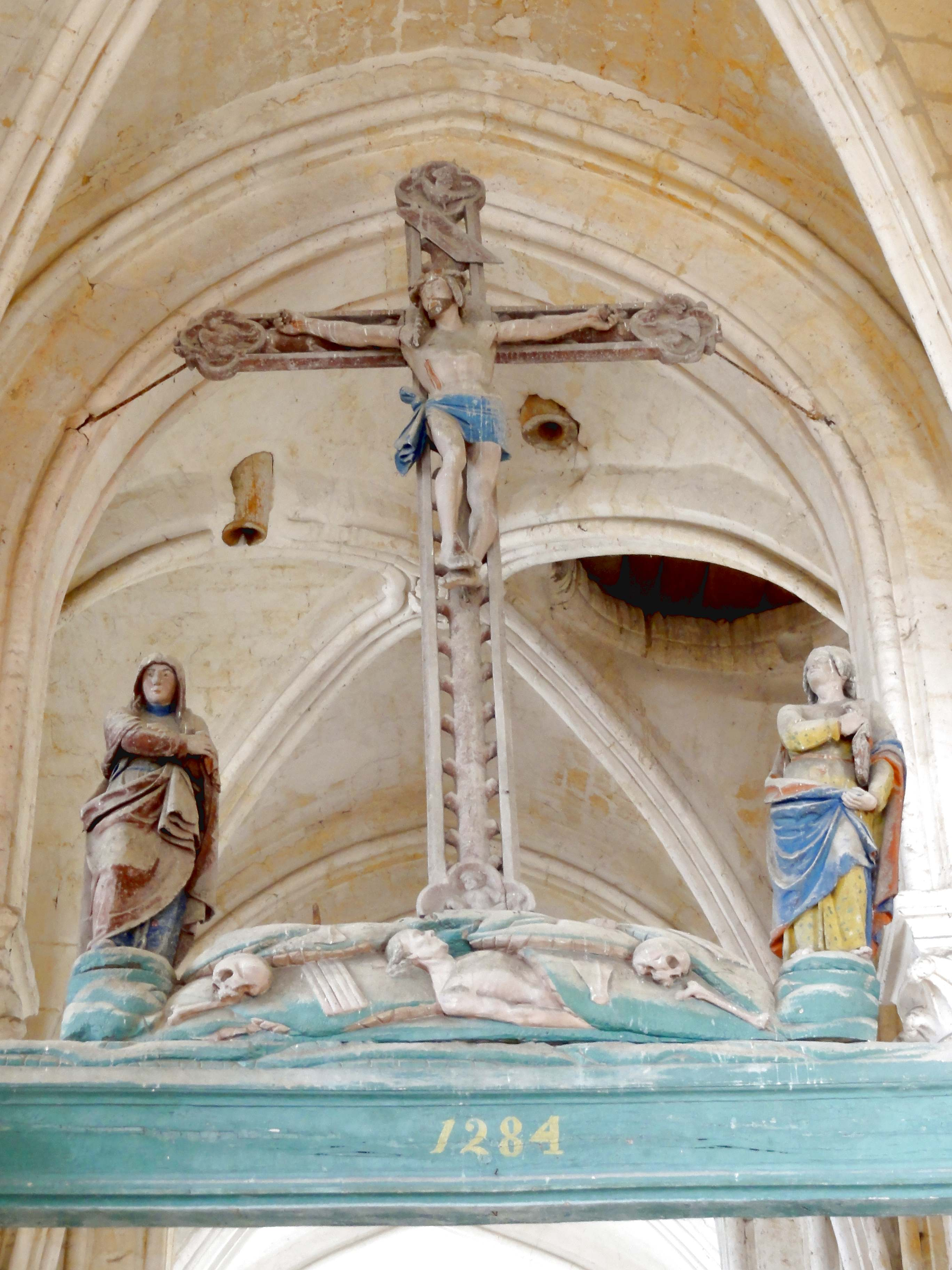 Mobilier de l'église - voir titre.